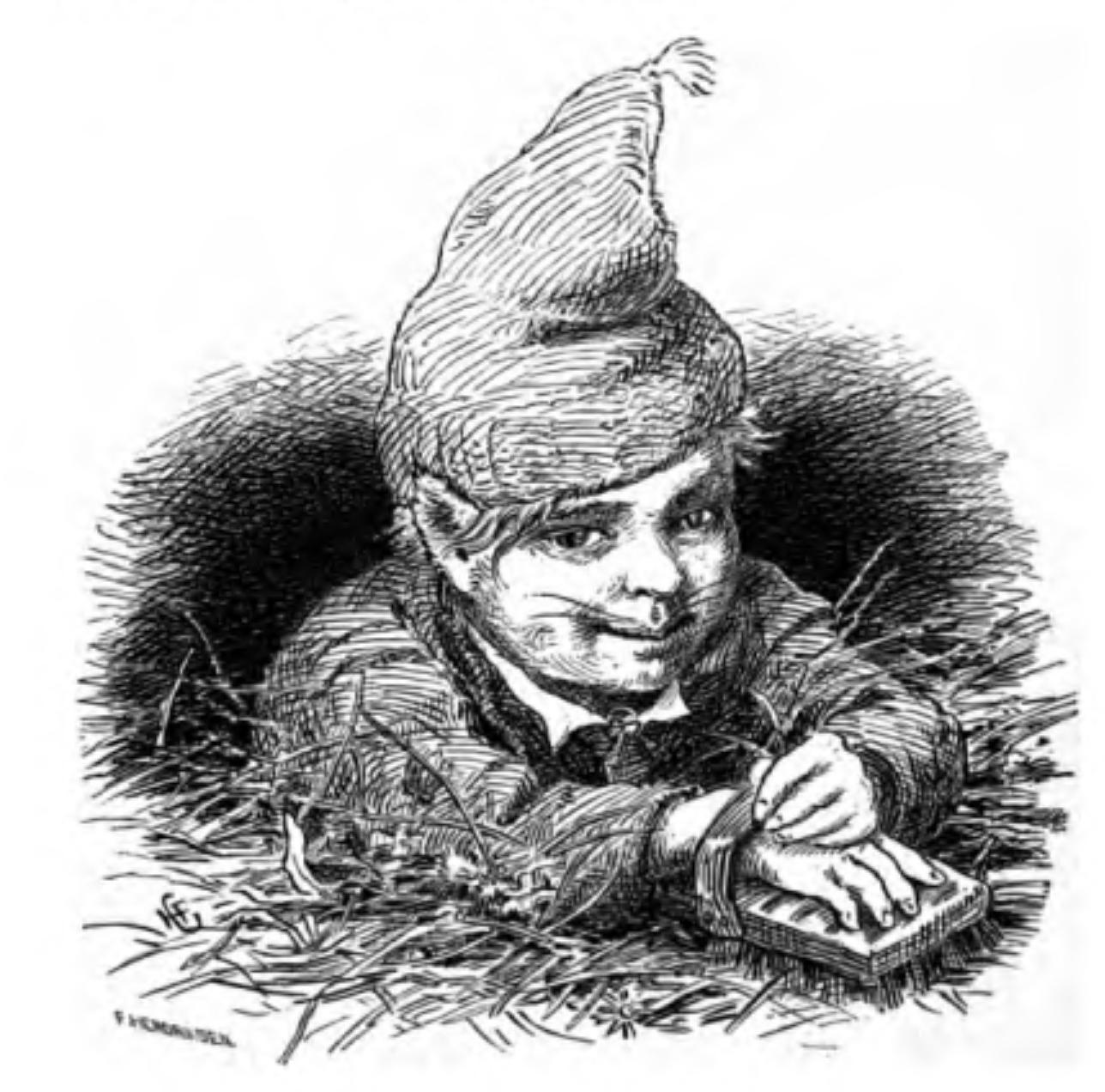 Nisse brukt som illustrasjon til Asbjørnsens fortelling En Aftenstund i et Proprietærkjøkken